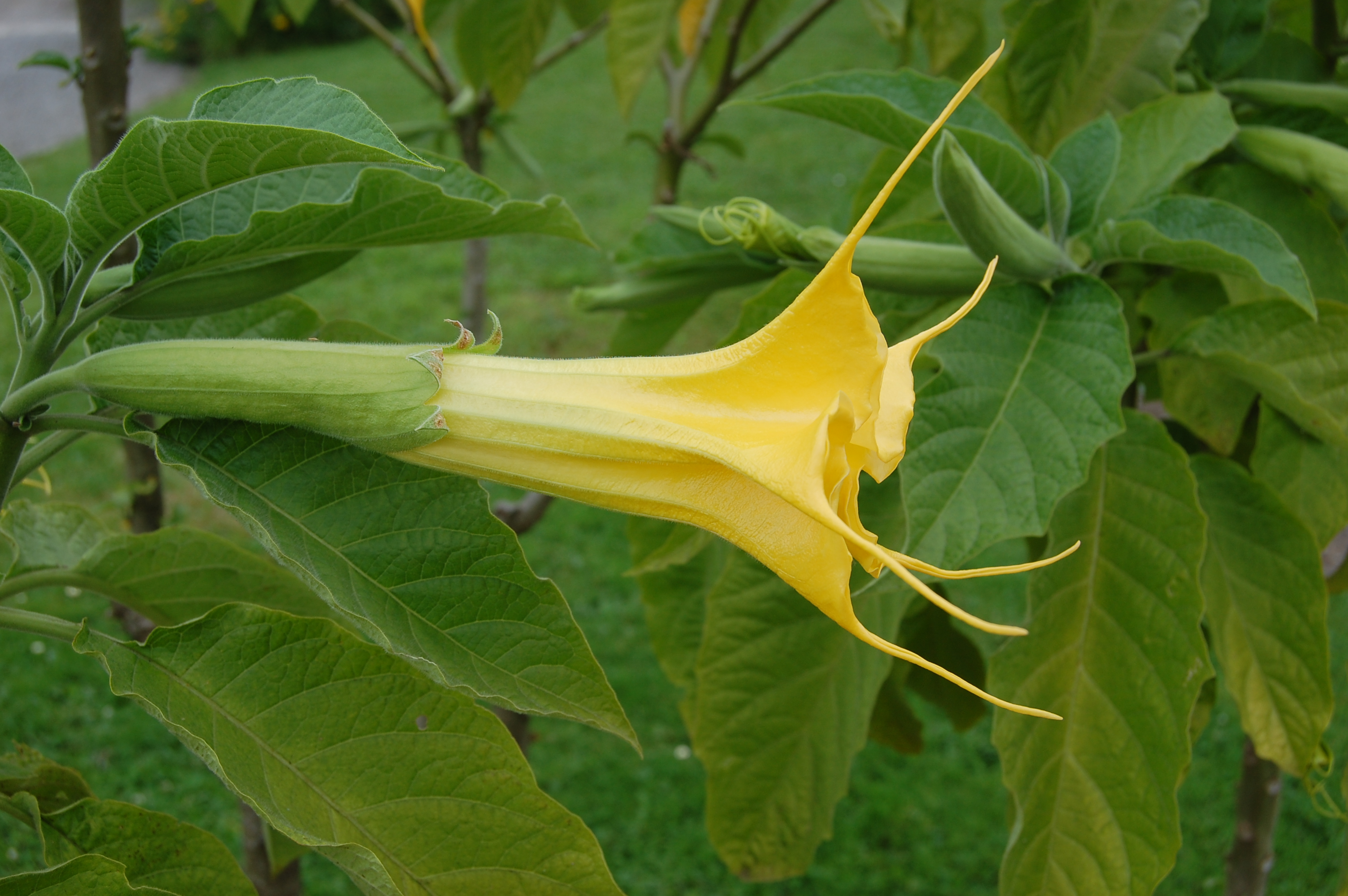 Brugmansia aurea